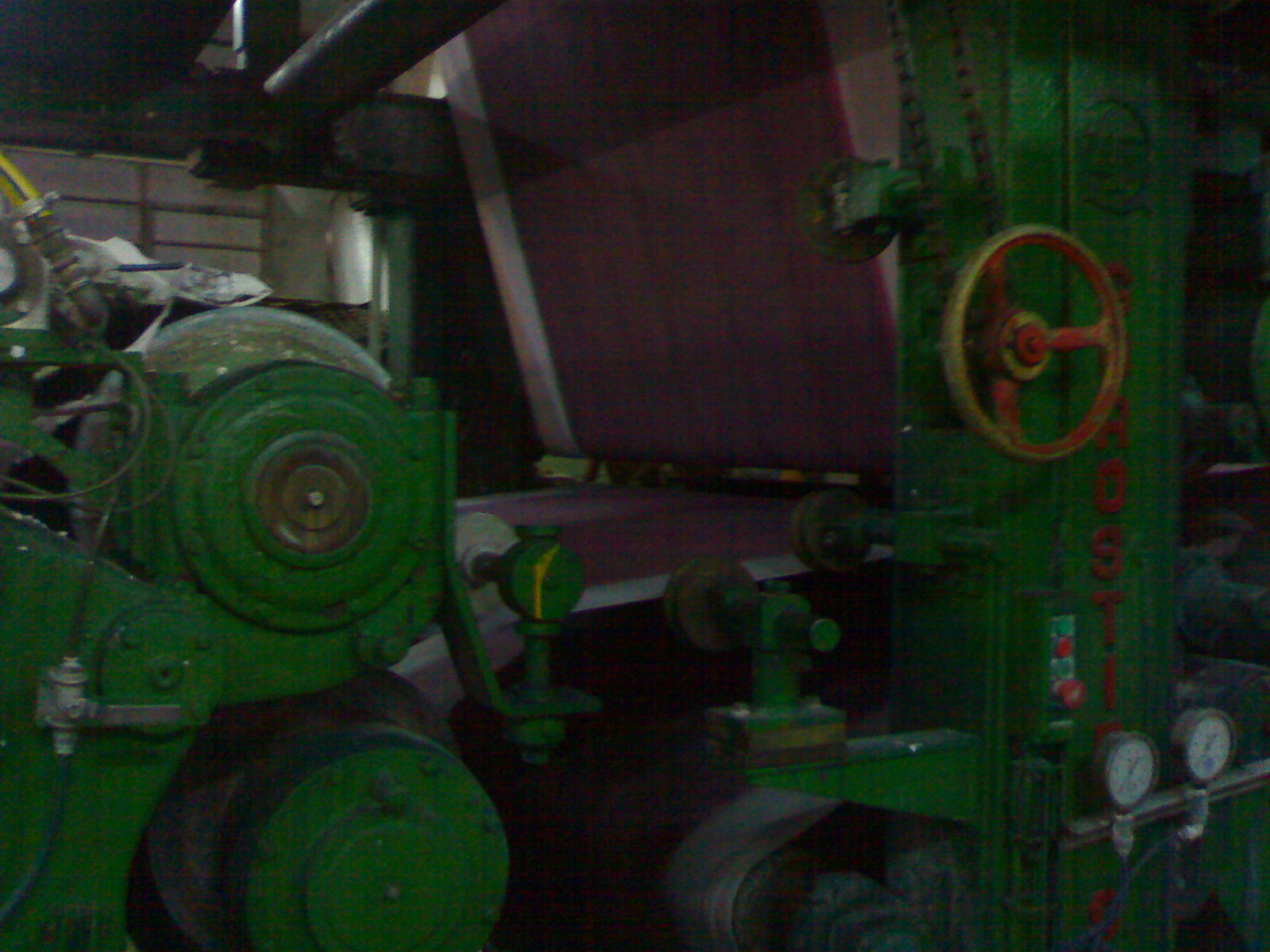 Comienzo de la zona de sequeria